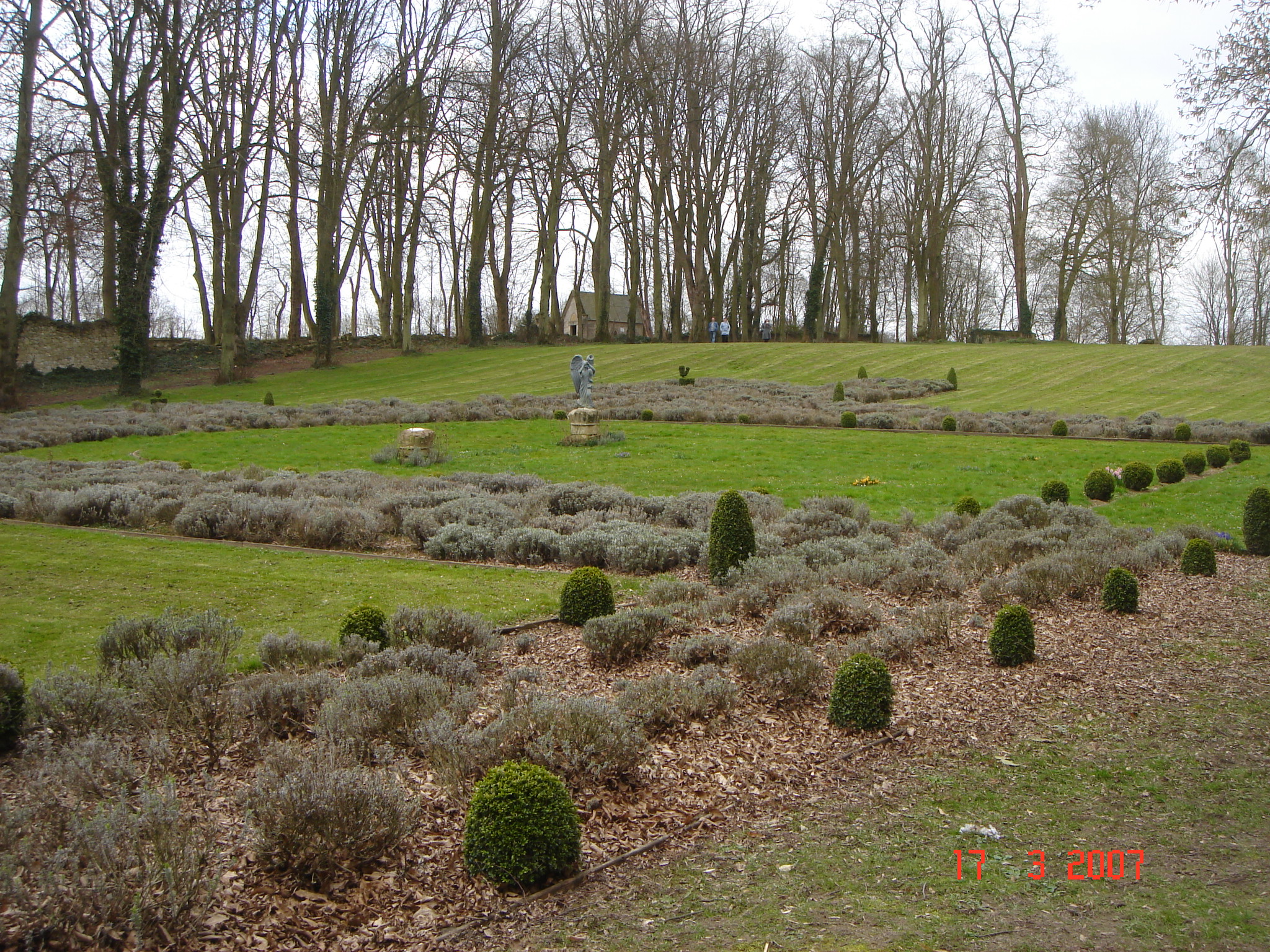 Abbaye de Vaucelles Lavande marquant l'emplacement de l'église